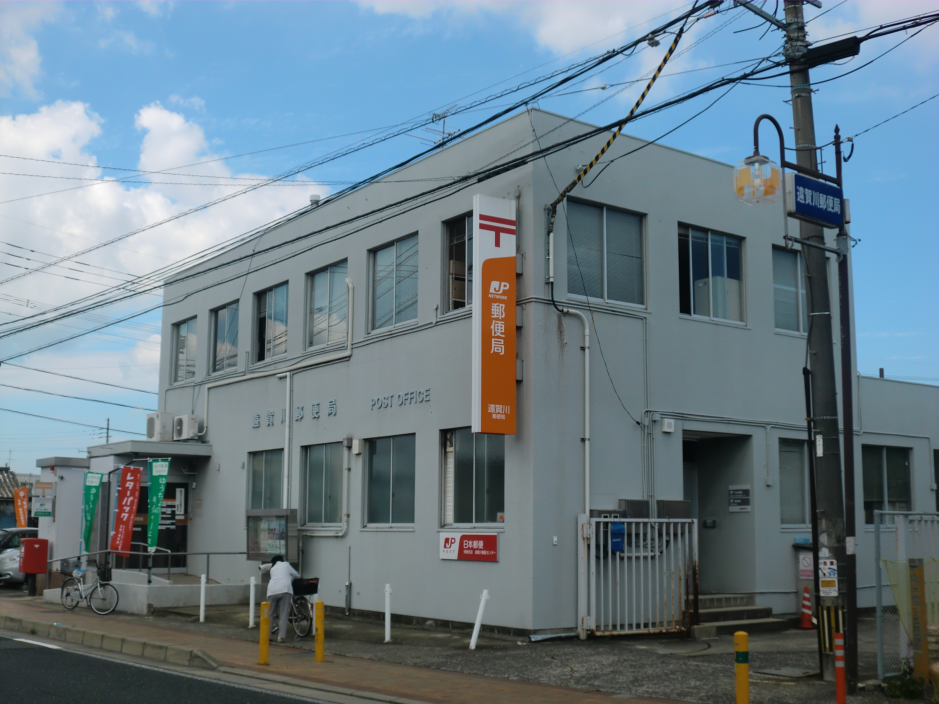 福岡県遠賀郡遠賀町にある遠賀川（おんががわ）郵便局